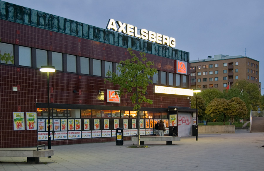 Axelsberg-ICA. Arkitekt: Ancker Gate Lindegren, Arkitekter SAR (Arkitektkontor). Byggherre: Byggnadsfirman Folke Ericsson (1966-1971)